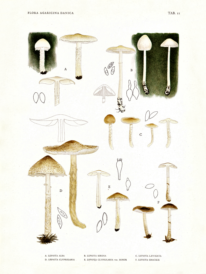 Jakob Emanuel Lange: Lepiotagattungen